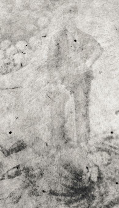 Grabado del asesinato del general Reyna Barrios.